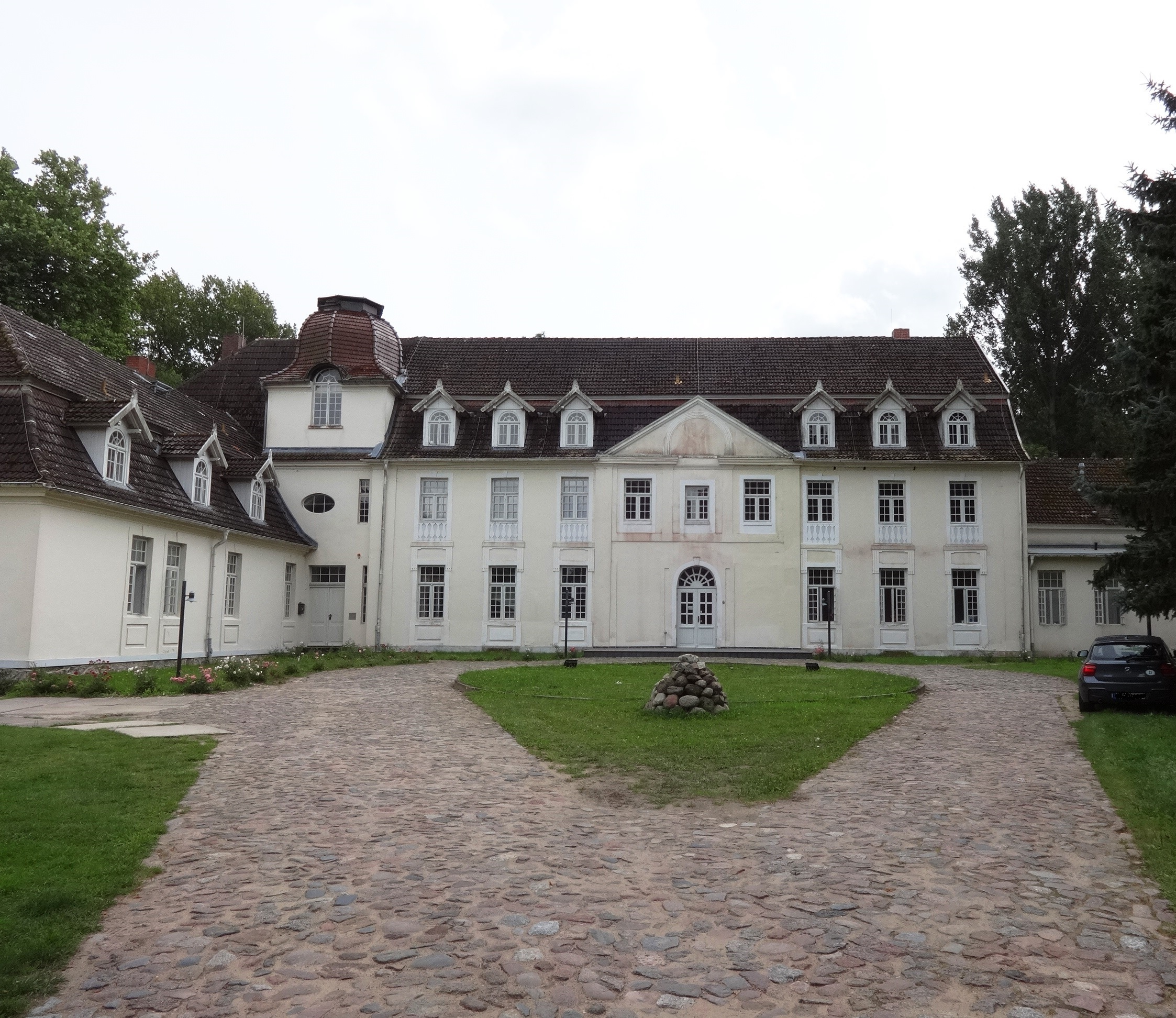 Herrenhaus aus dem 18. Jahrhundert in Buggenhagen, Mecklenburg-Vorpommern